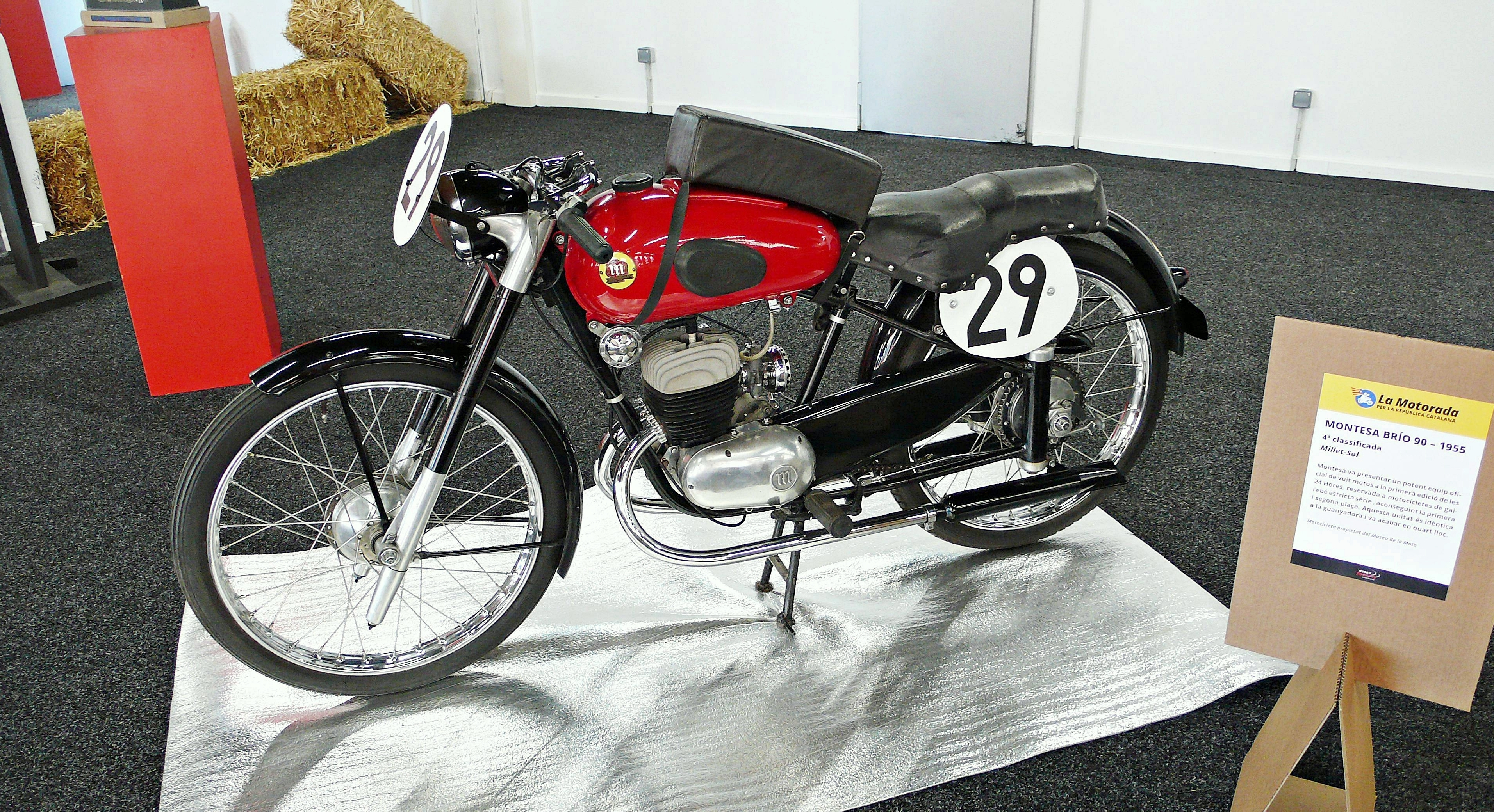 Exposicion motos clasicas 24 Horas de Catalunya